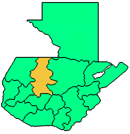 Mappa della diocesi cattolica di Quiché, in Guatemala. Lavoro personale eseguito a partire da questa immagine di Commons. Fonte per i confini delle diocesi